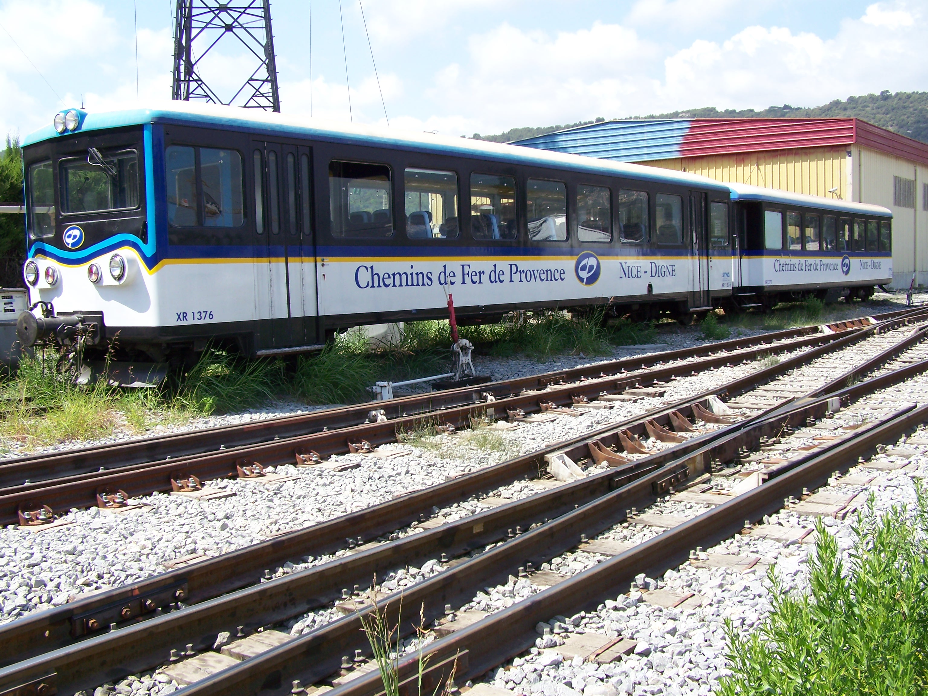 Rame réversible XR1376+XR1372 des Chemins de fer de Provence en gare de Nice-Lingostière (Alpes-Maritimes, France). Voiture pilote ex Chemins de fer du Jura (Suisse), voiture intermédiaire ex Appenzellerbahnen (Suisse), utilisées avec locomotive diesel T66.